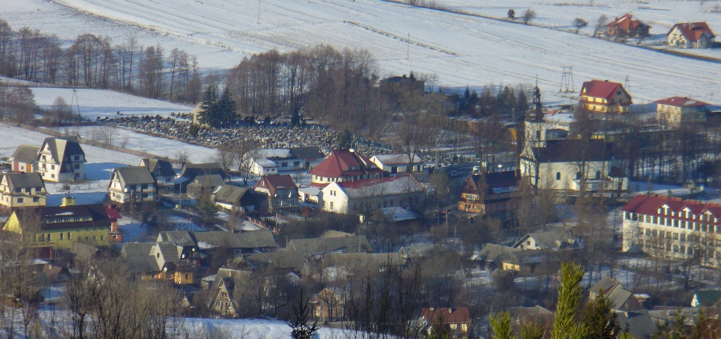 Panorama centrum Sidziny zimą